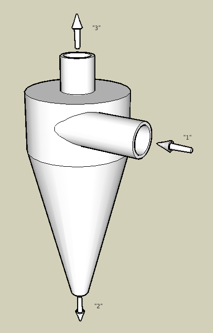 hydrocyclone